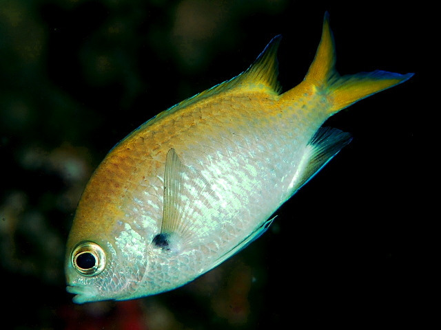 ナノハナスズメダイ Chromis katoi